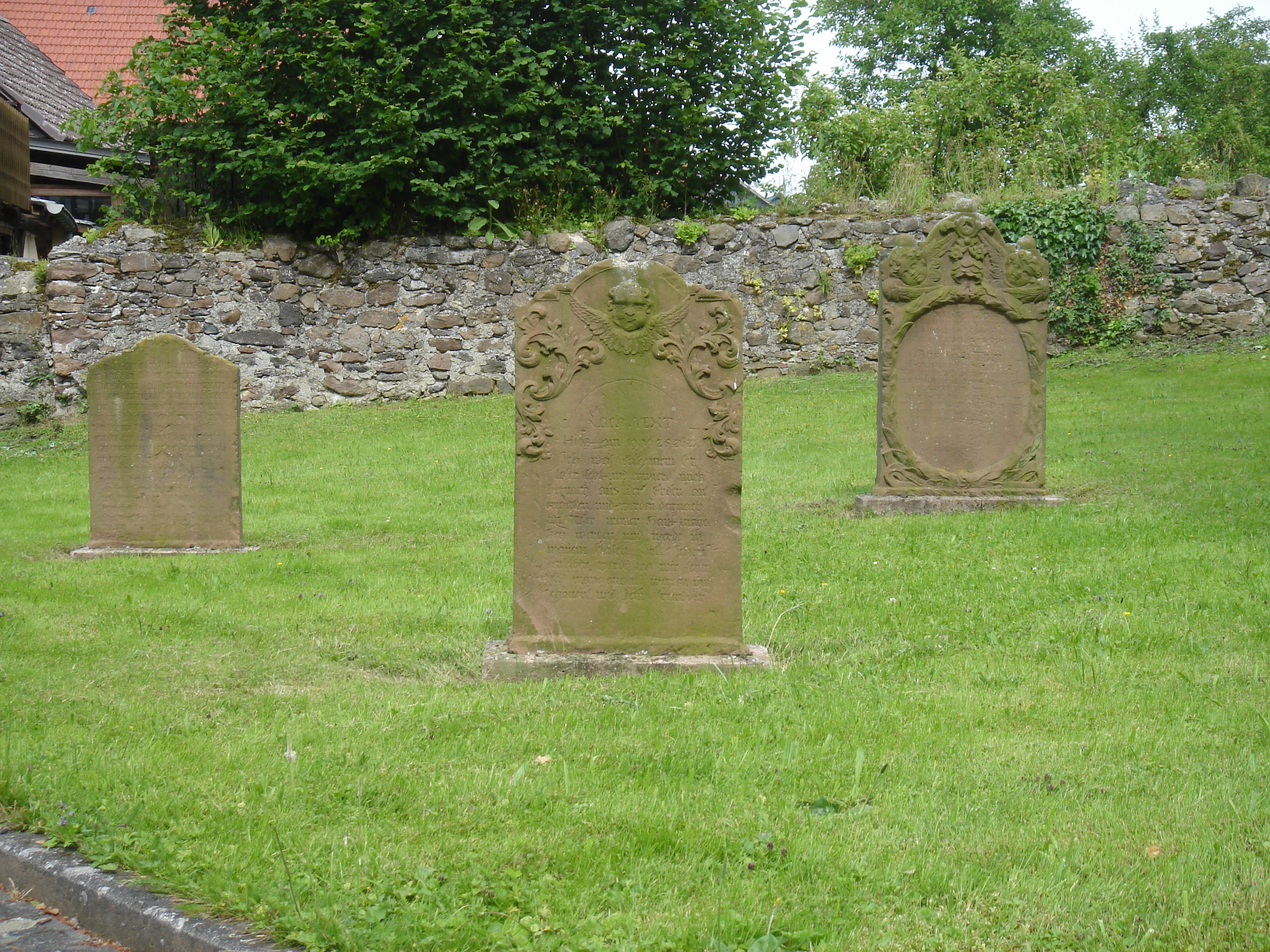 Reste des alten Friedhofs um die Kirche des ehemaligen Klosters Hachborn